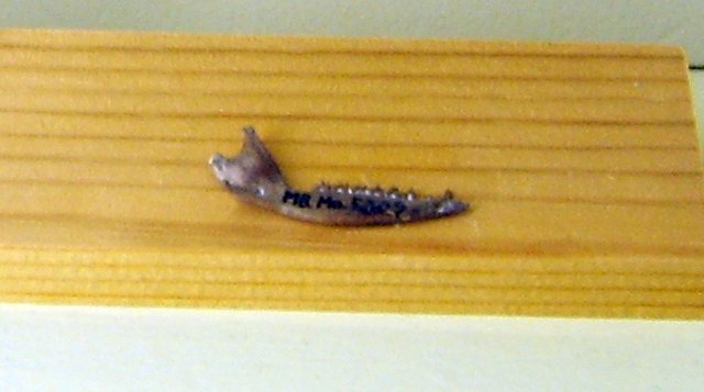 Peratherium blainvillei lower jaw at the Museum für Naturkunde, Berlin.